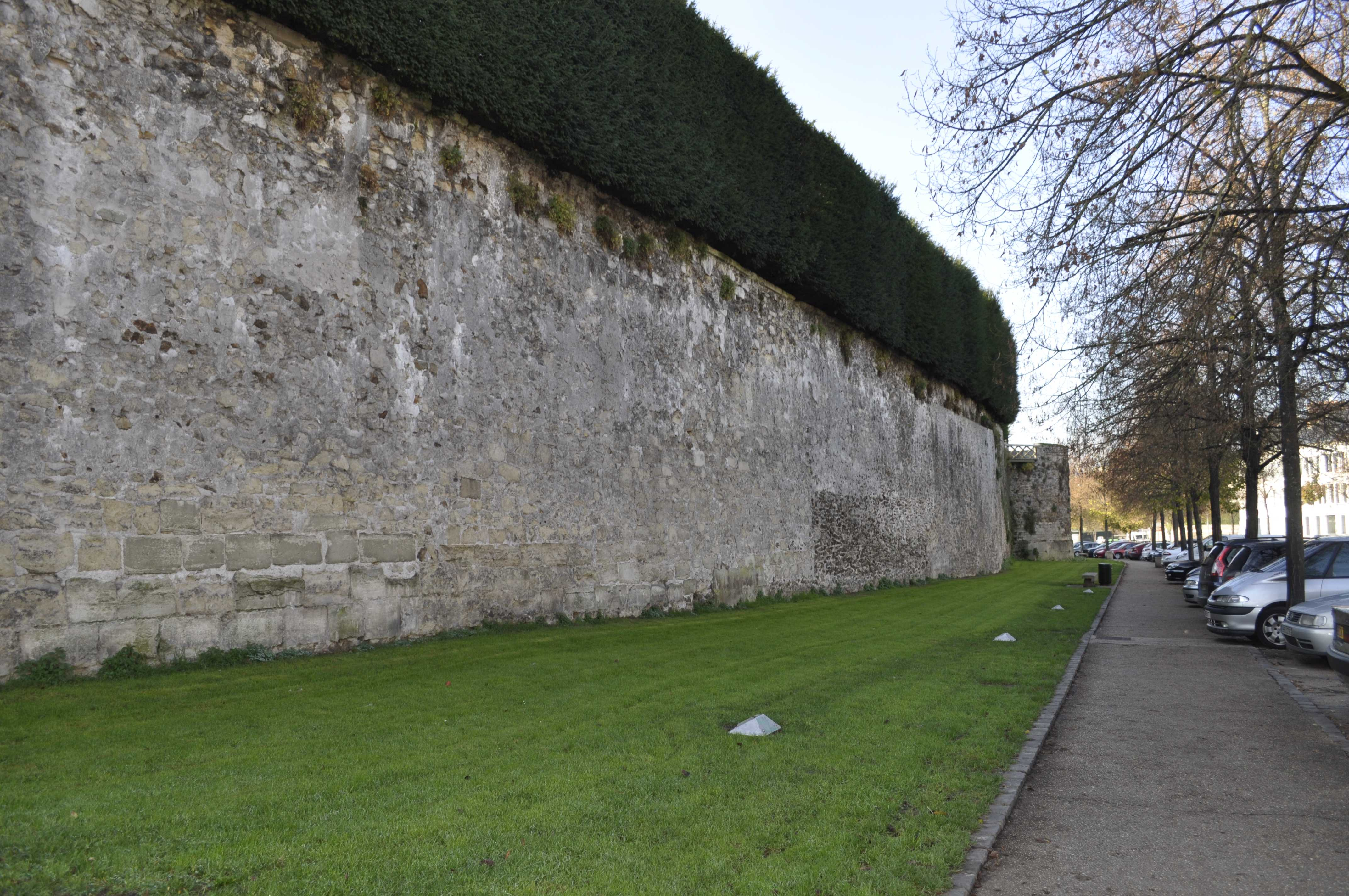 Remparts de Meaux.